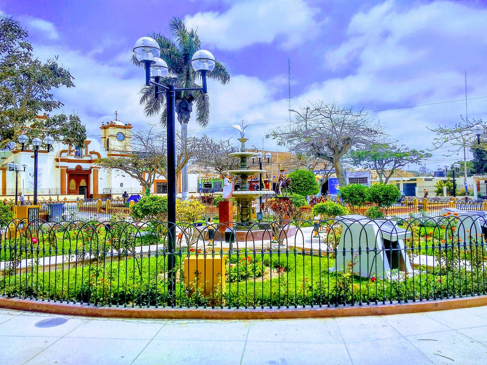 Plaza de armas del distrito de Paijan